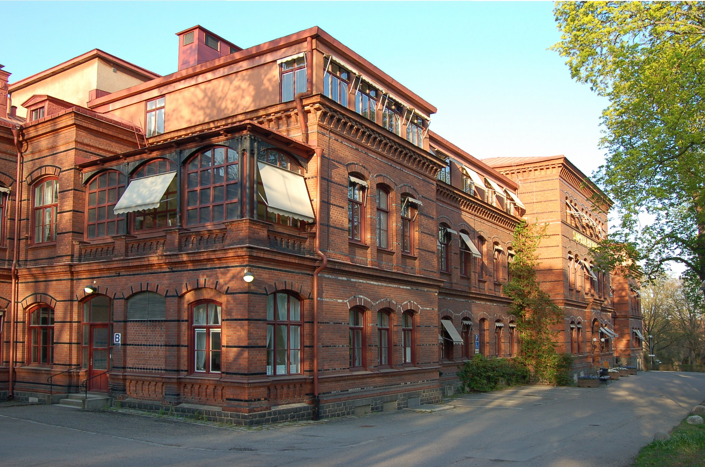 Sophiahemmets entré från väst.